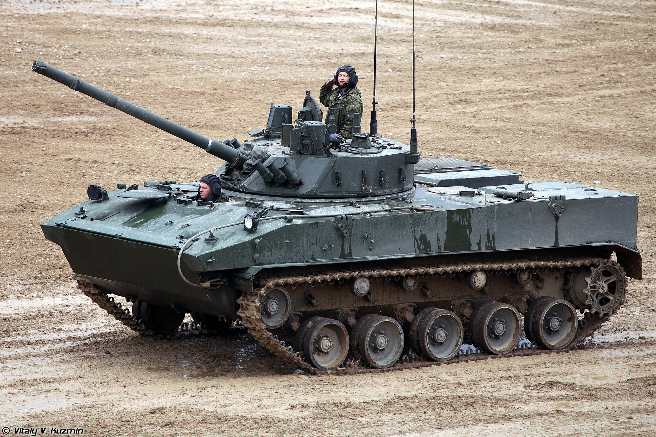 Боевая машина десанта БМД-4М (BMD-4M infantry fighting vehicle)